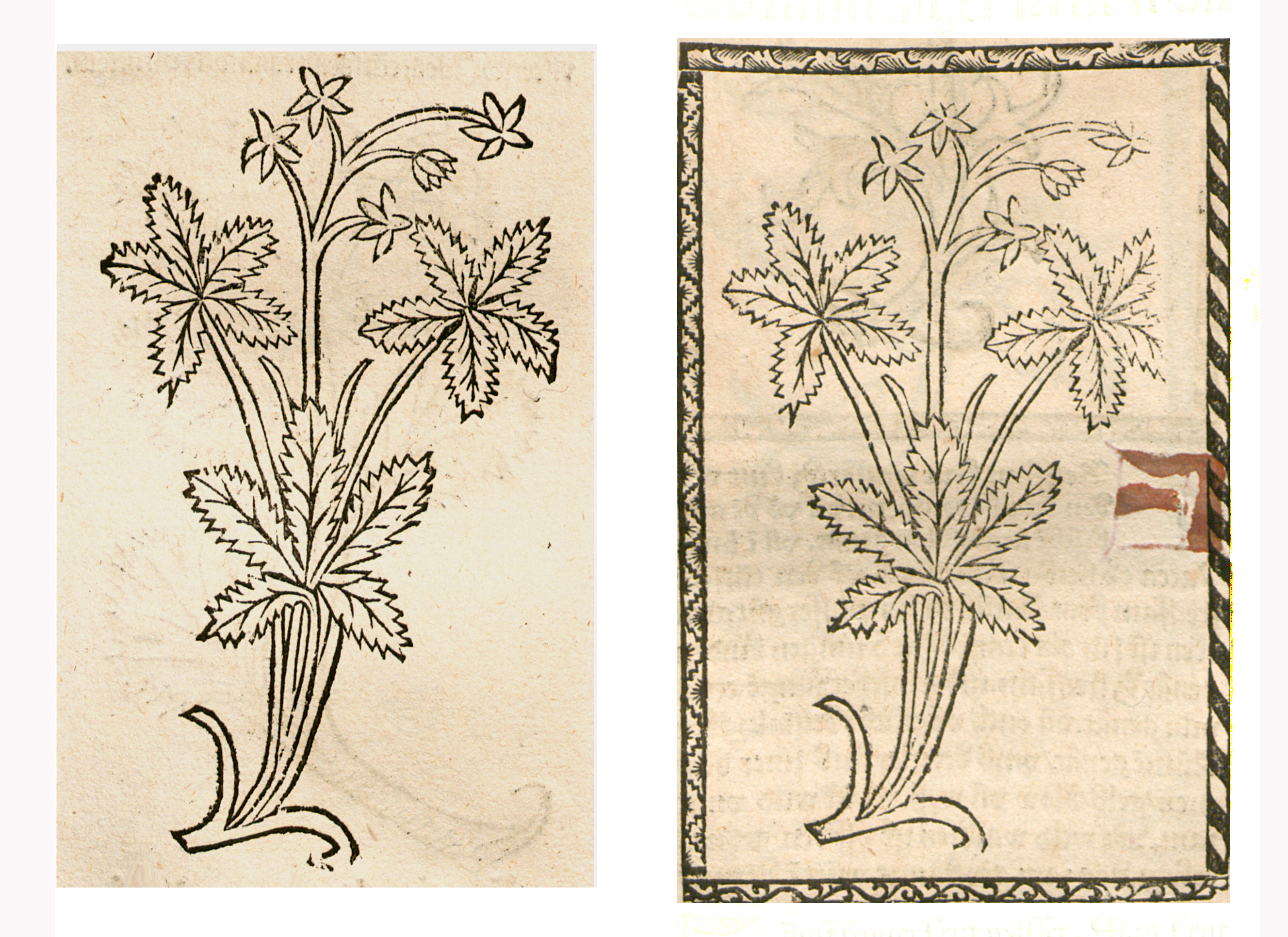 Abbildung zum Kapitel Fünffingerkrut (Potentilla reptans)